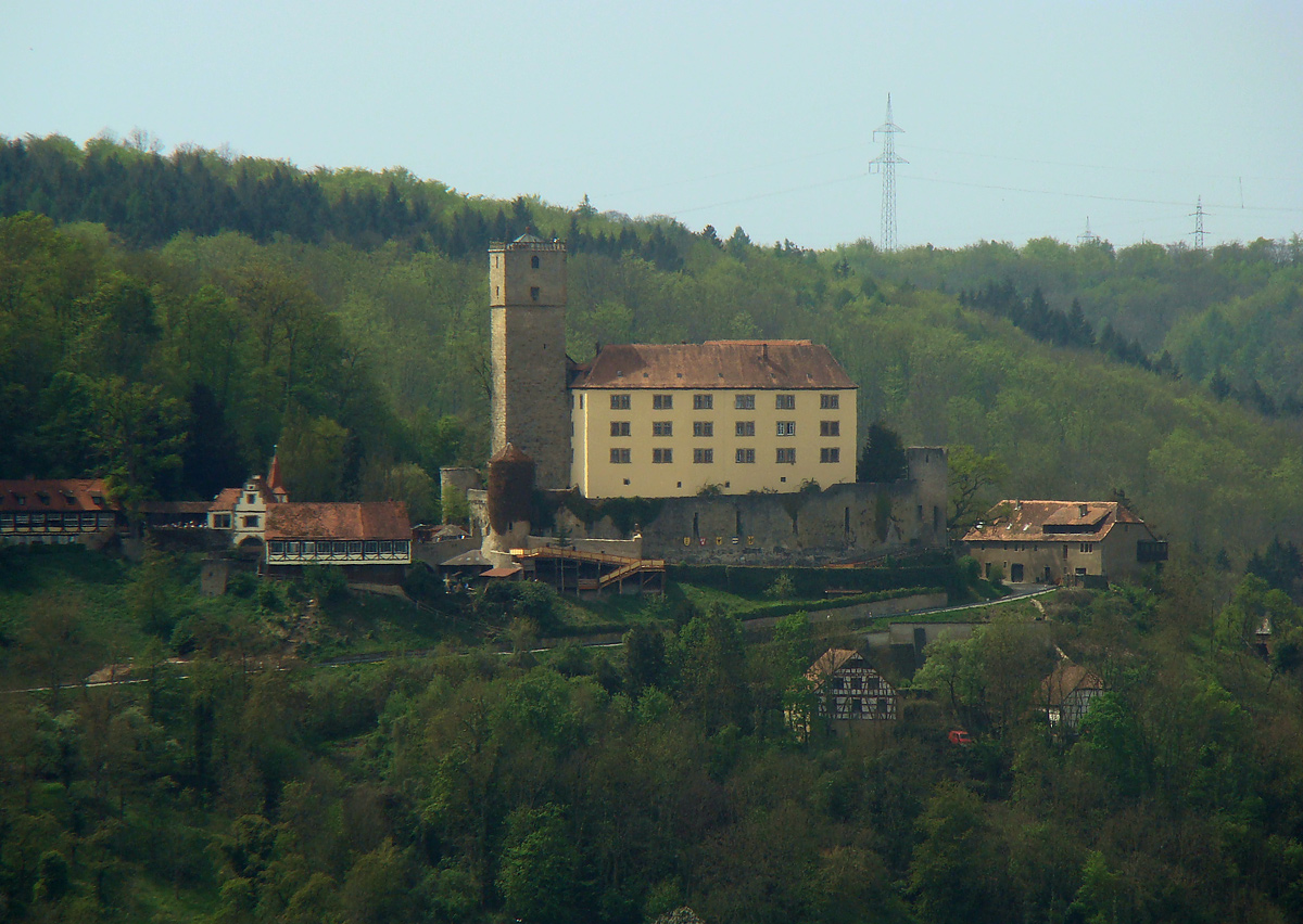 Burg Guttenberg am Neckar, von Gundelsheim aus gesehen